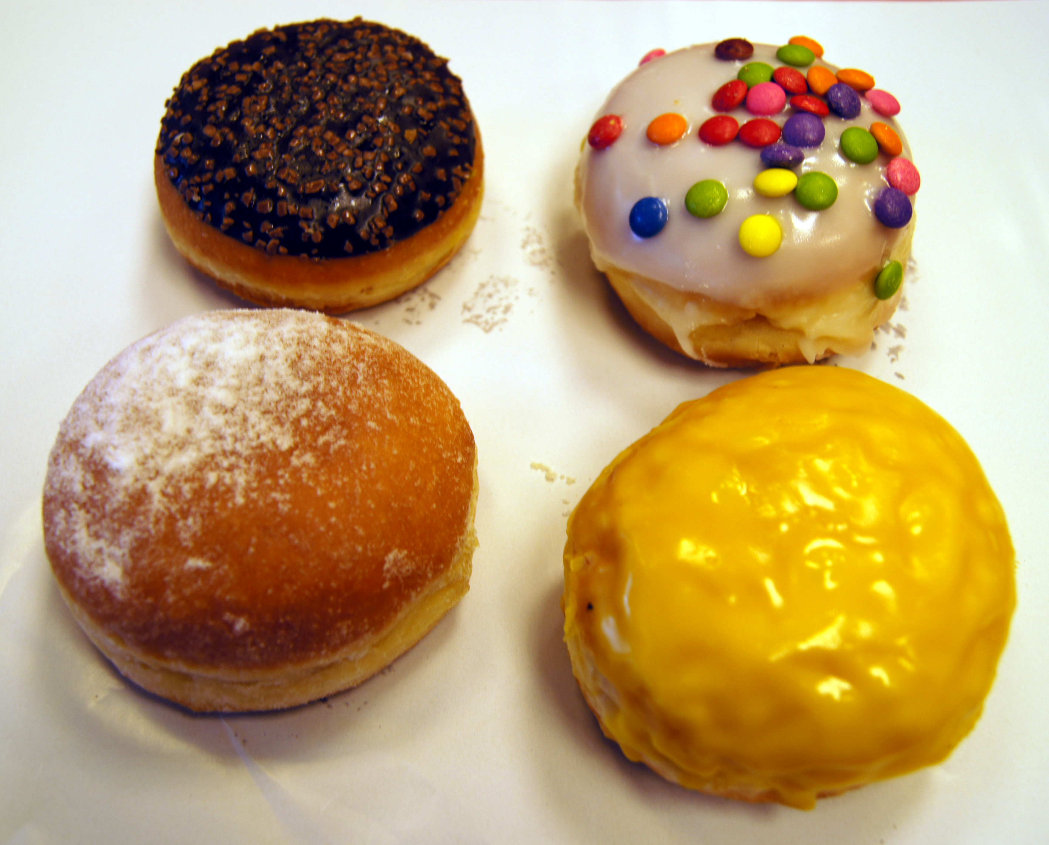 Berliner Pfannkuchen in Stuttgart - genannt "Berliner", normal und 3 "Spezial-Berliner"